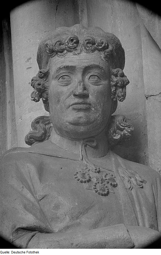 Original image description from the Deutsche FotothekDetail der Stifterfigur Ekkehard im Naumburger Dom St. Peter und Paul